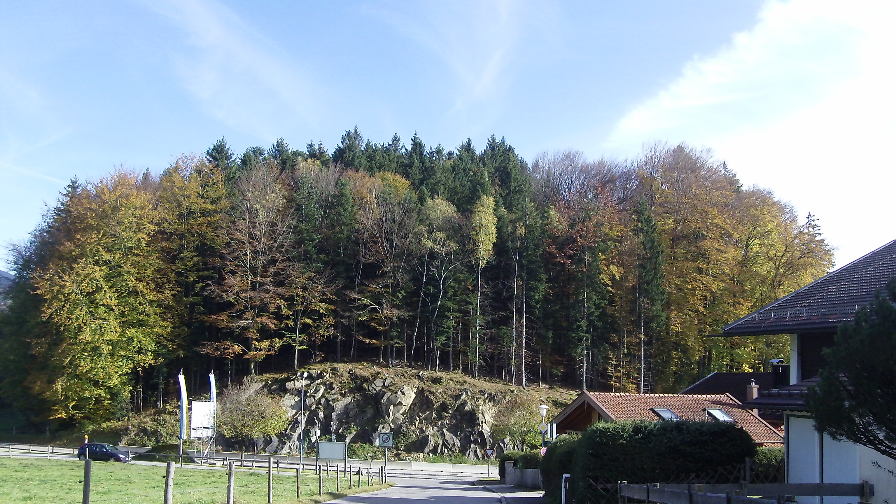 Franzosenhügel mit sichtbarer Flyschsandsteinformation am Ortseingang Bad Wiessee